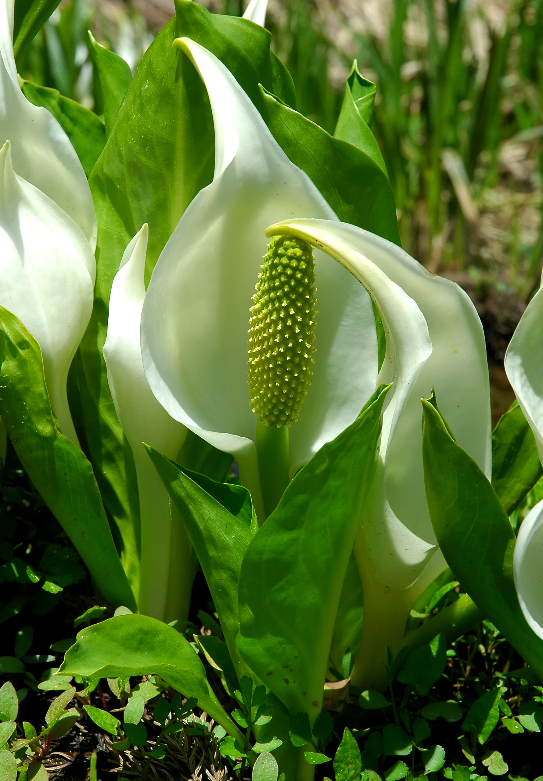 Lysichiton camtschatcense (ミズバショウ)